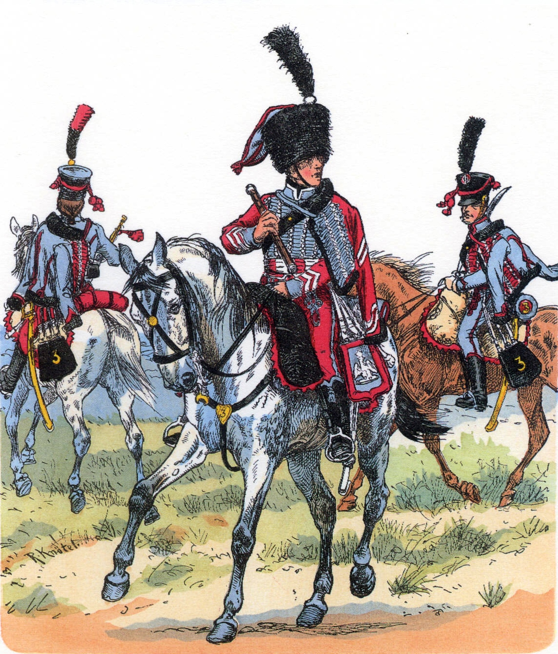 3e régiment de hussards, 1806-1814 : trompette, chef de musique et hussard.